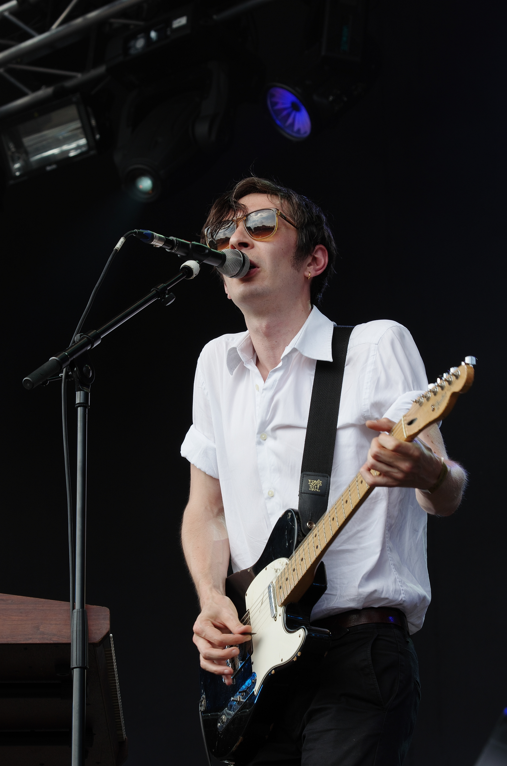 Ja, Panik ist eine österreichische Musikgruppe, die Ende 2005 gegründet wurde. Andreas Spechtl (g, voc).